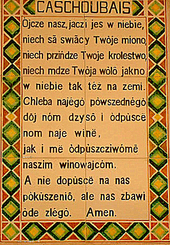 Kaszëbsczi: Jerozolëma, kòscel Pater noster, "Òjcze nasz" pò kaszëbskù